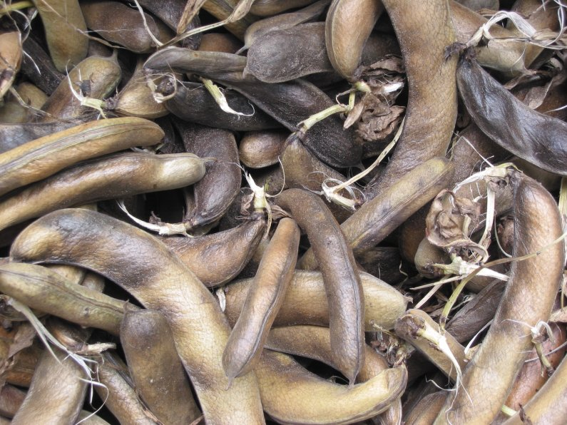 Vicia faba (Tuinboon) ripe seedpods